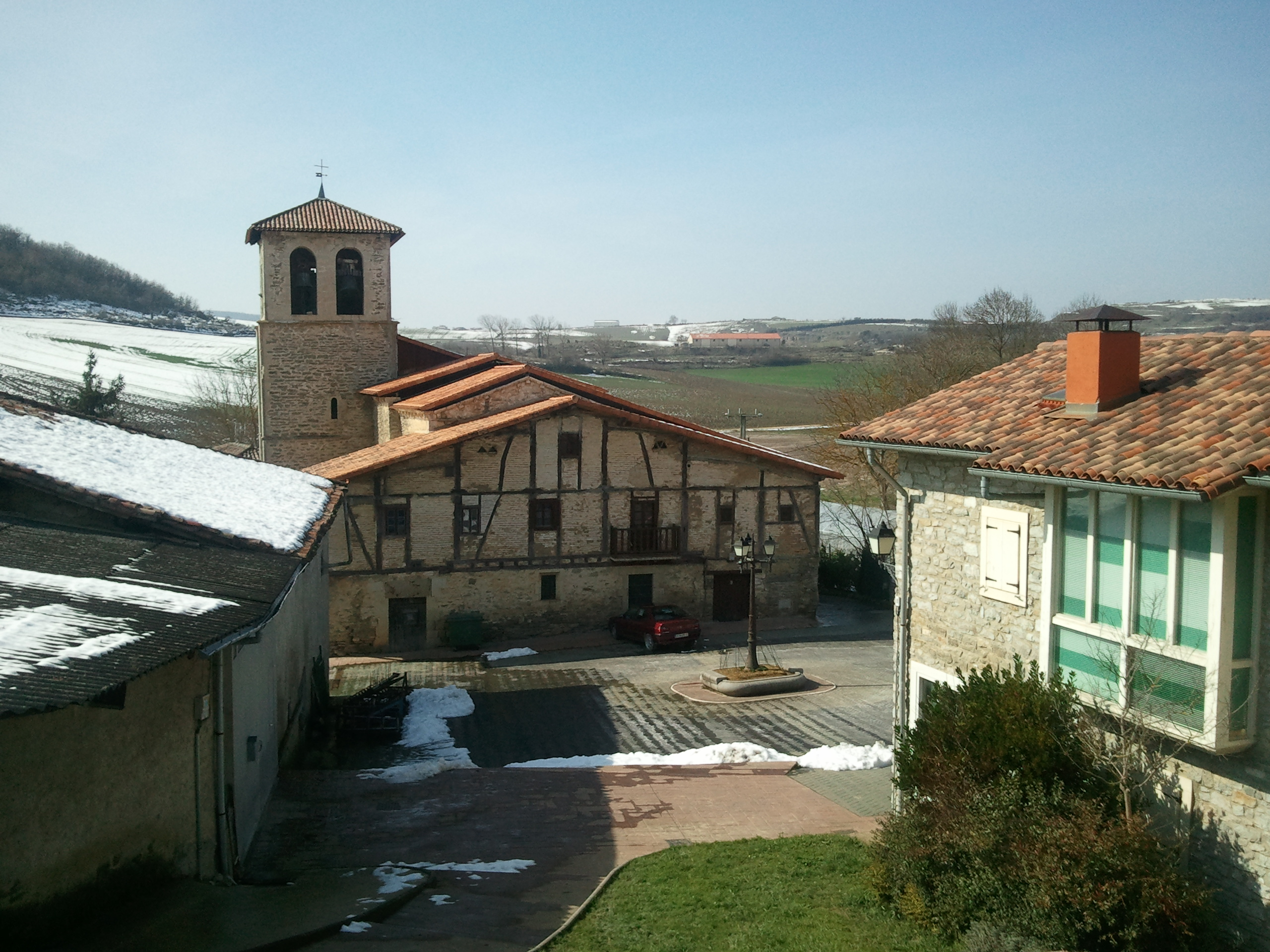 Monasterioguren (Gasteiz)